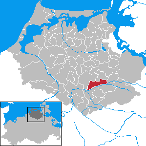 Splietsdorf in Mecklenburg-Vorpommern - District Nordvorpommern